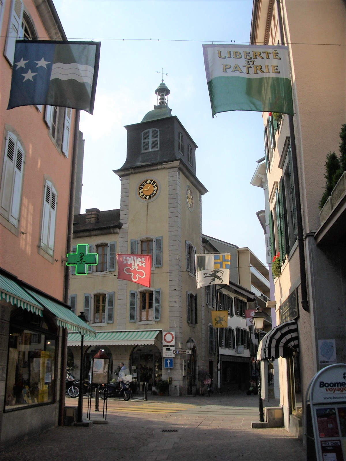 Aigle VD, Switzerland self-made, August 2006